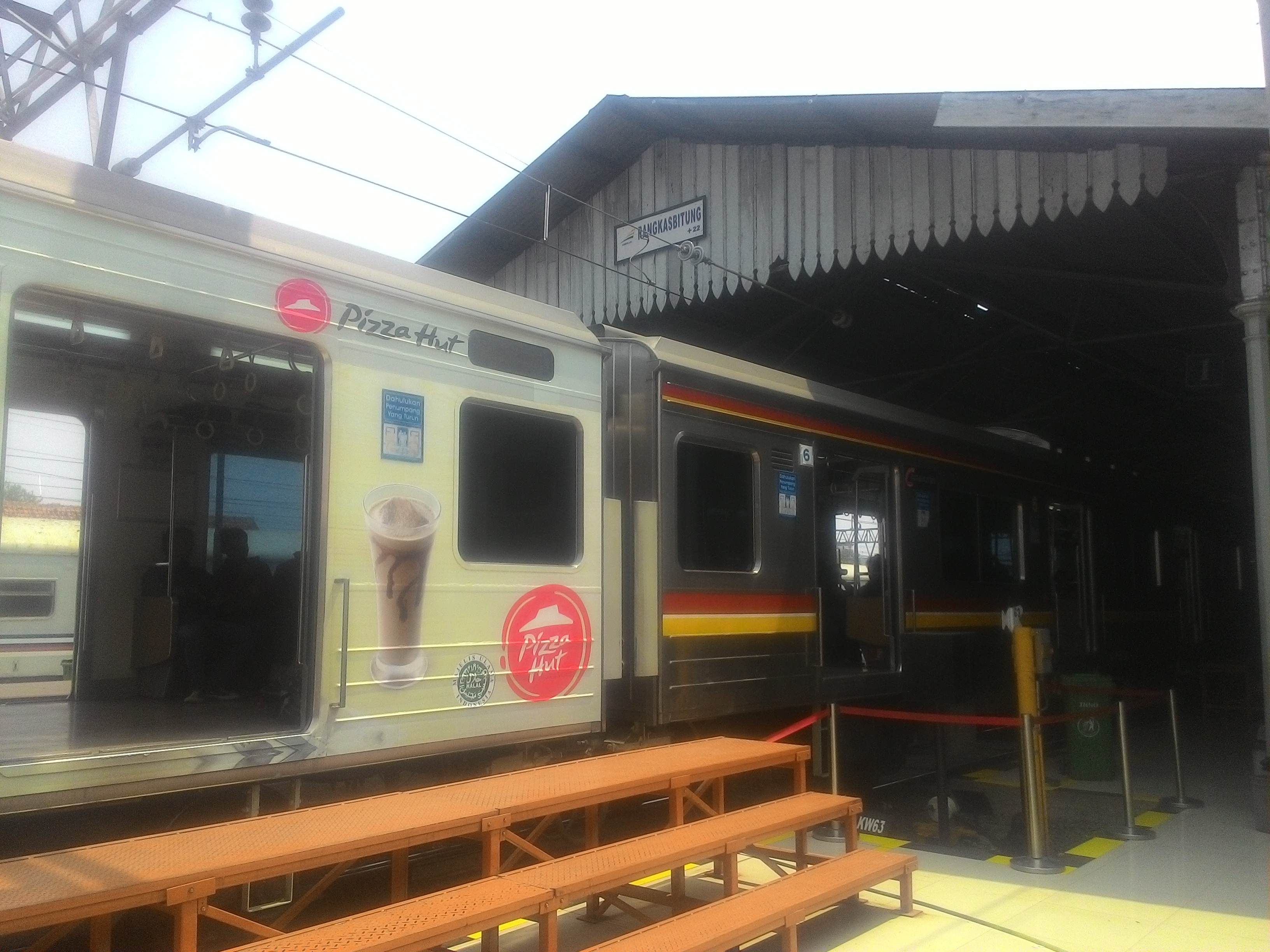 KRL Commuter Line dan Stasiun Rangkasbitung (Maaf salah nama file 😅)